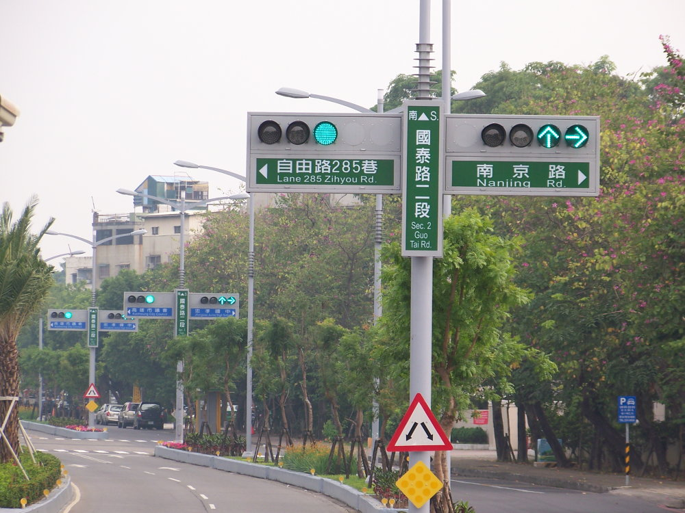 連鎖號誌運作